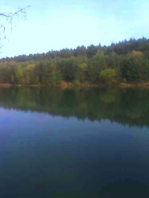 Jezioro leśne, Biestrzynnik